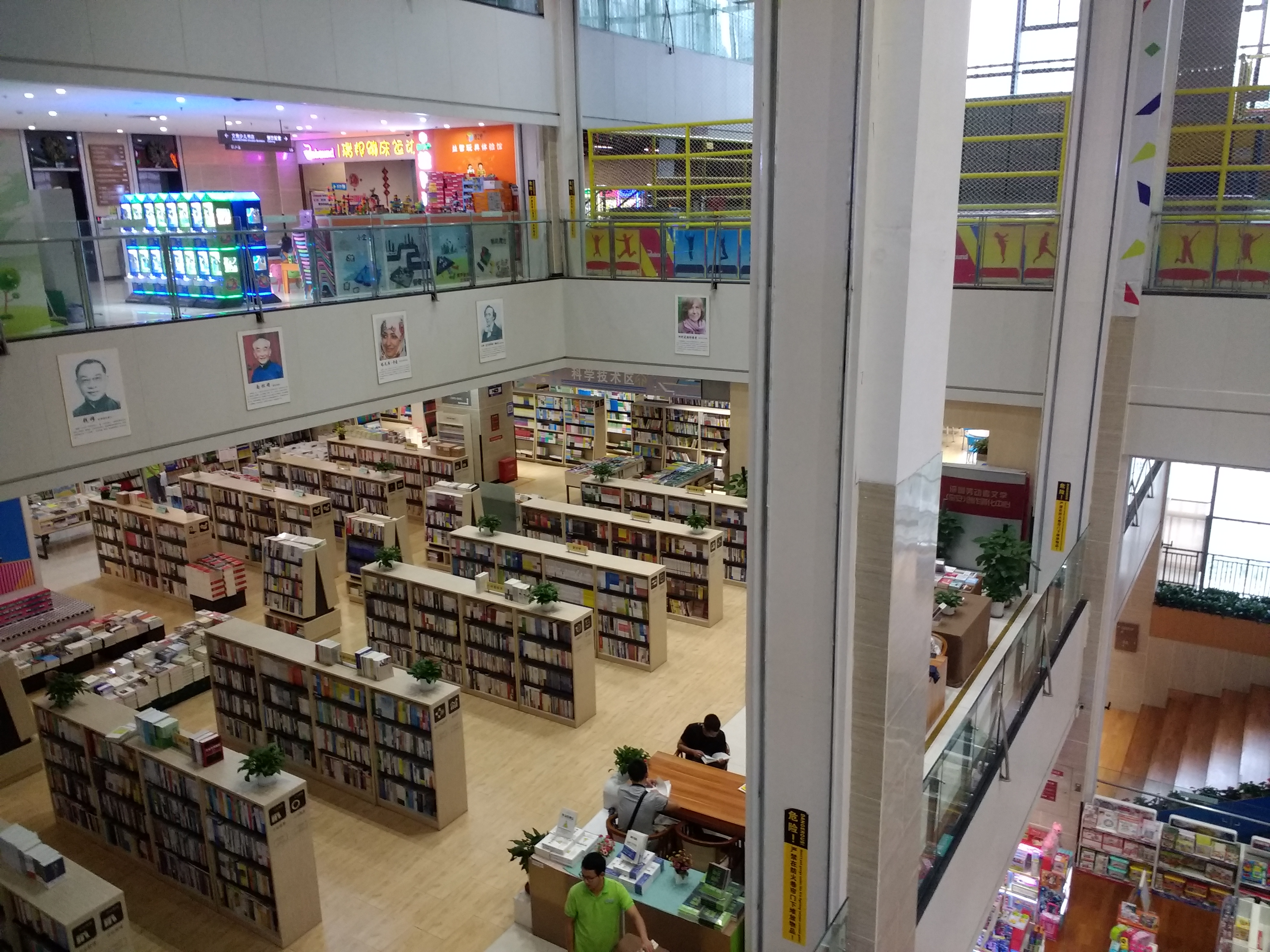 中文（中国大陆）: 深圳书城宝安城